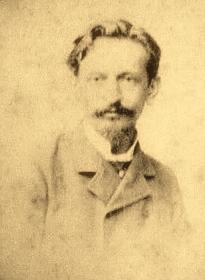 A portrait of Angelo Agostini.